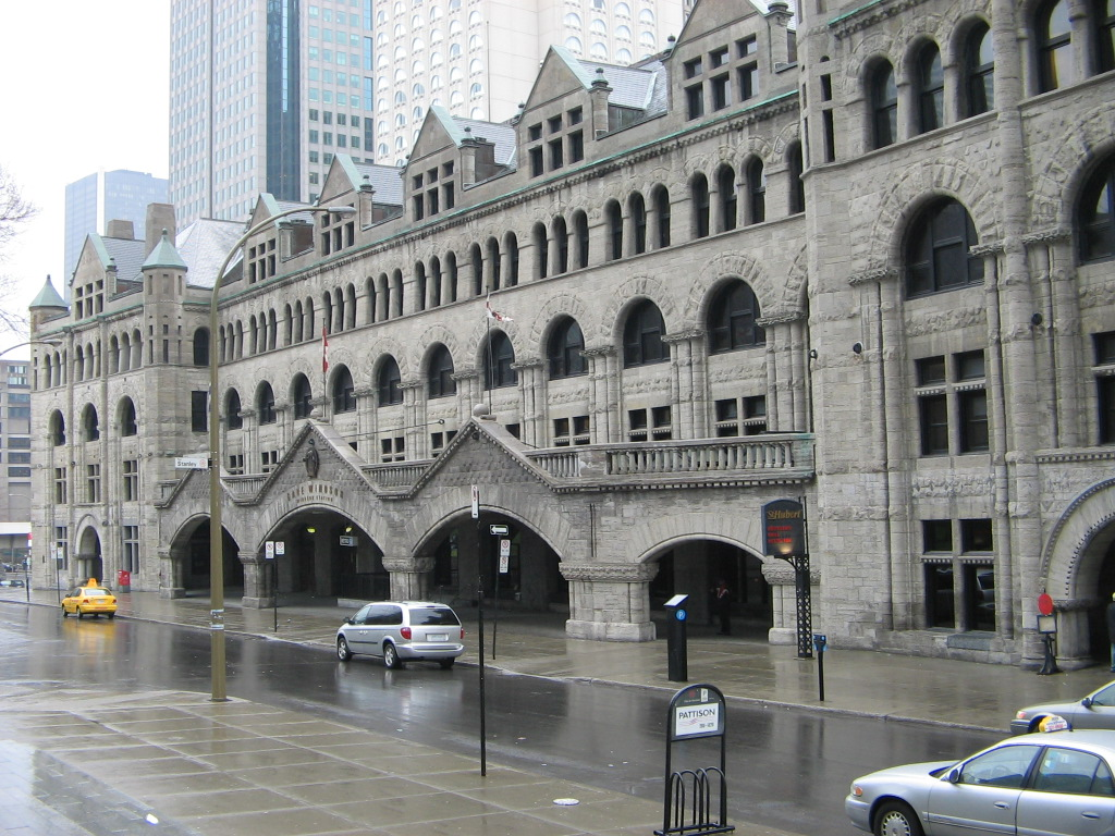 Gare Windsor de Montréal sur la rue de la Gauchetière